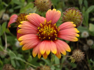 牛心山沿途的天人菊